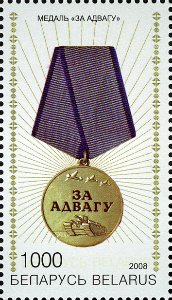 № 750. Медаль “За отвагу”